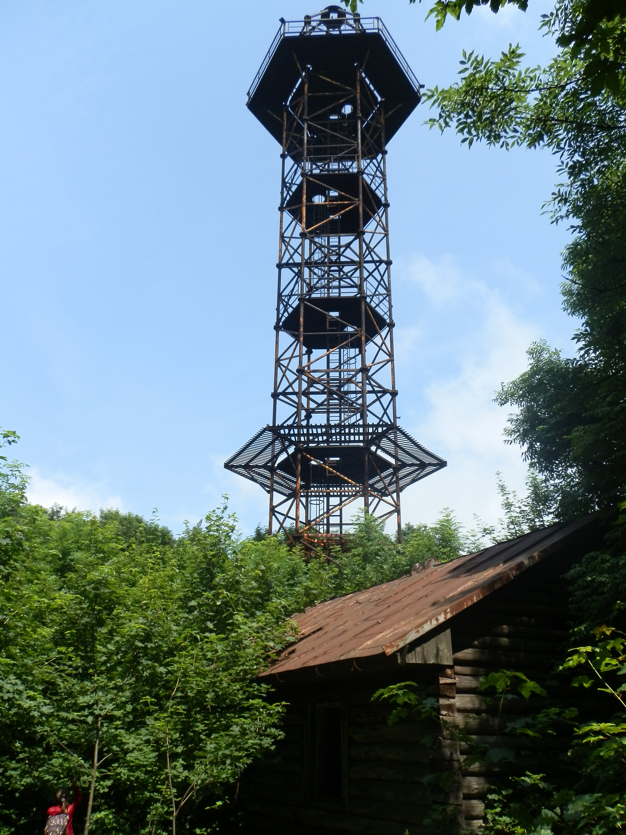 Starý vojenský areál Jelenec